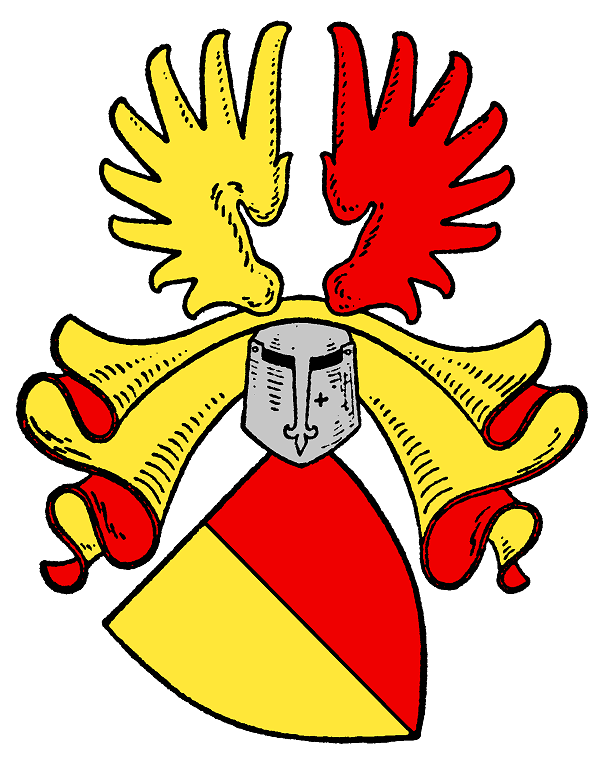 Wappen der von Erdmannsdorff (Variante in Sachsen)